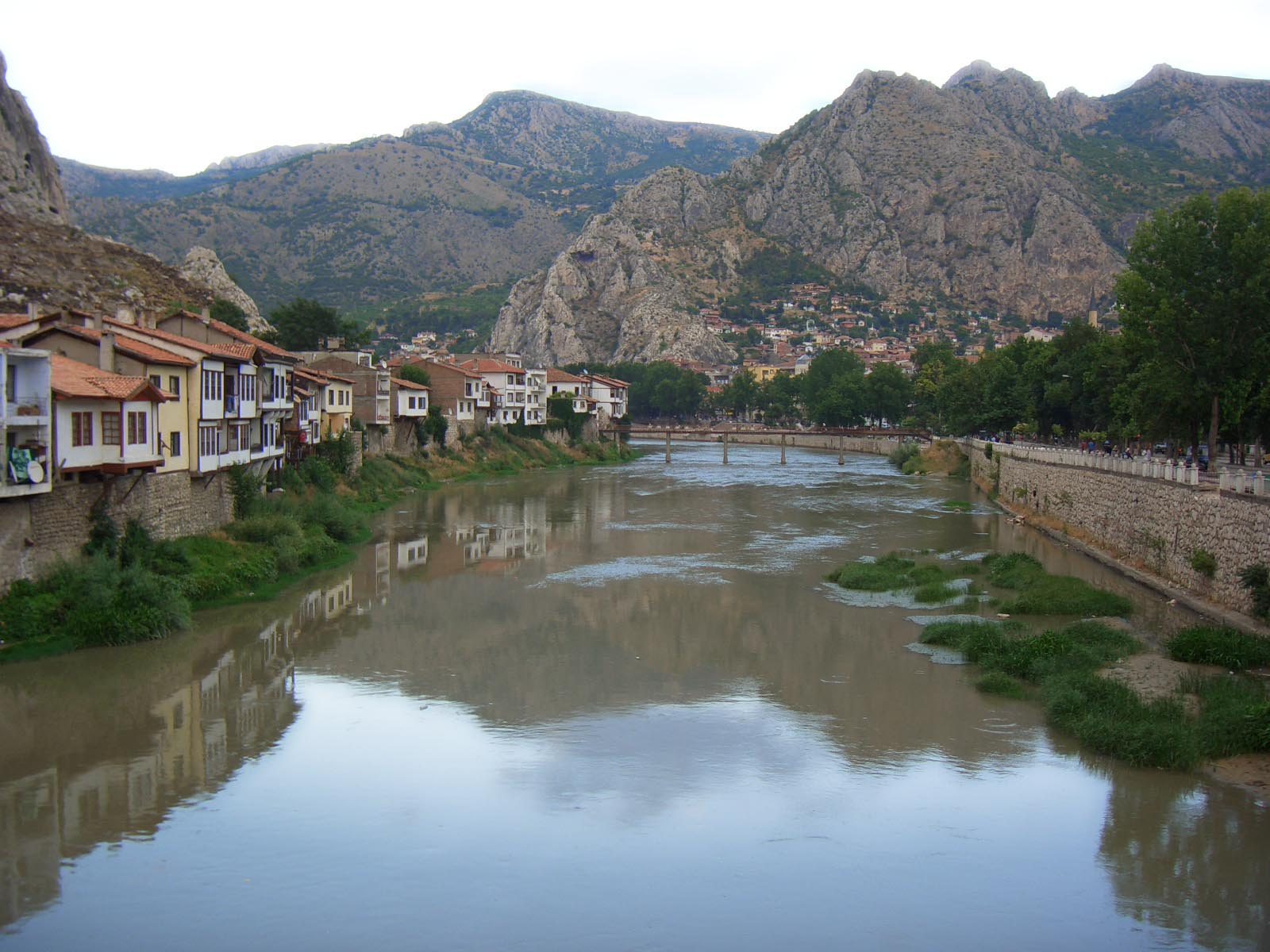 Bir Amasya manzarası. Fotoğraf, 8 Temmuz 2006 tarihinde benim (Ahmet Keleş) tarafından çekilmiştir.